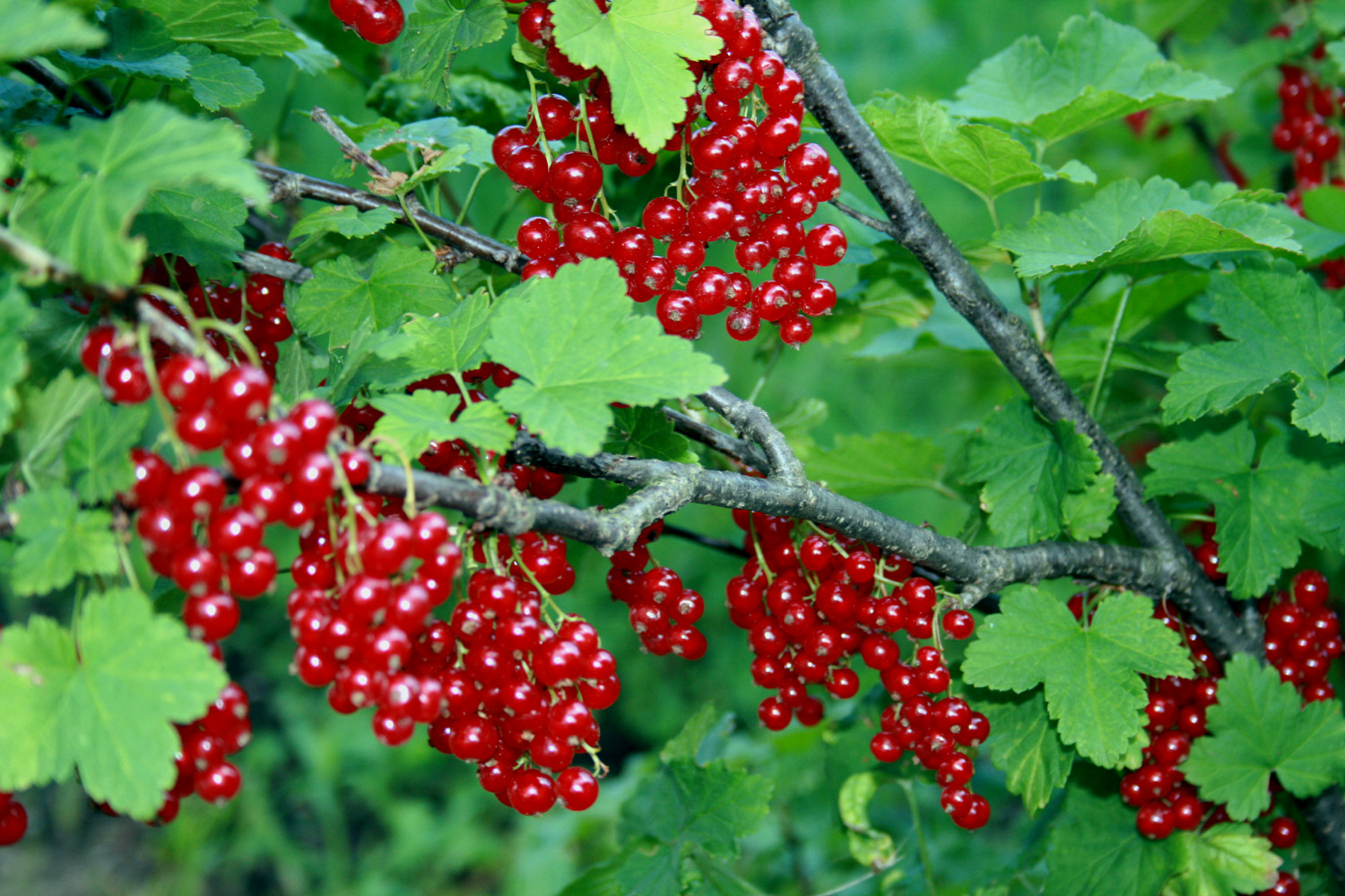 Red currant (červený rybíz) july 2007 Jaroměř, Czech Republic, Europe Author= Karelj